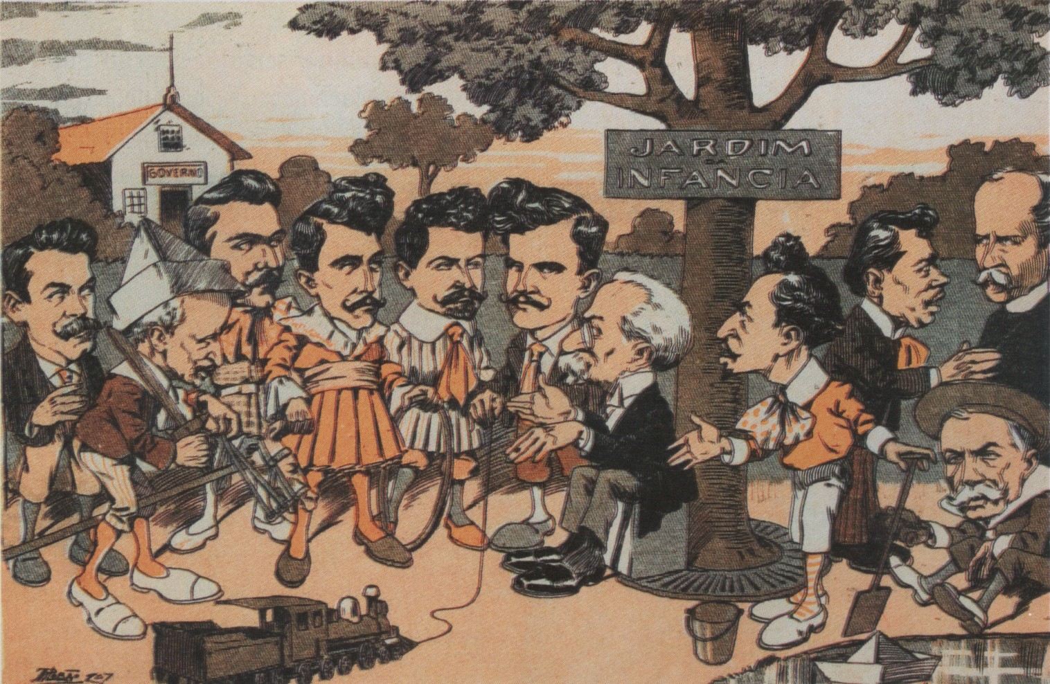 Caricatura representando o "jardim da infância" montado pelo gabinete do presidente Afonso Pena, publicada pela revista "O Malho"